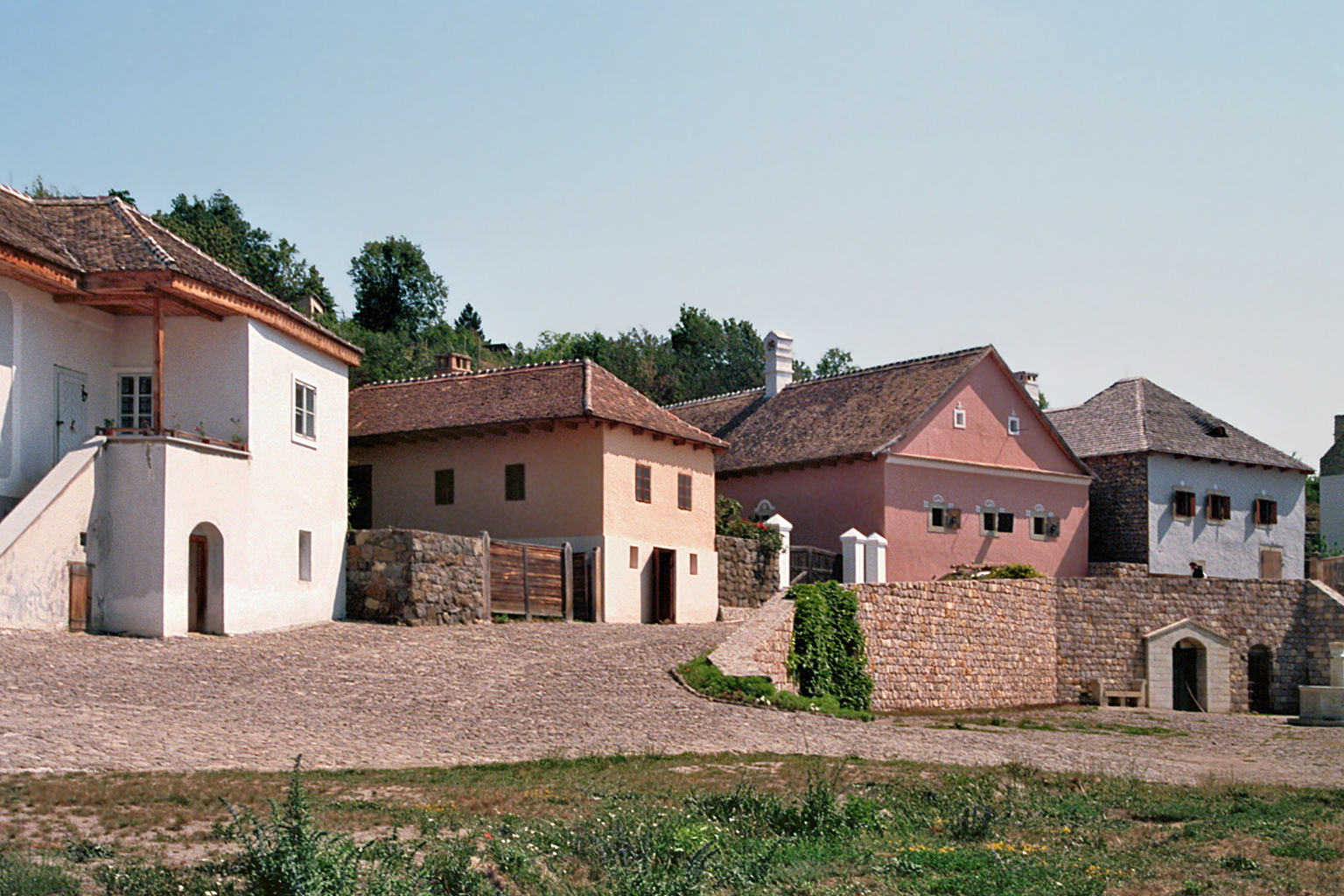 Szentendre, Skanzen (Ungarn): Hochlanddorf.